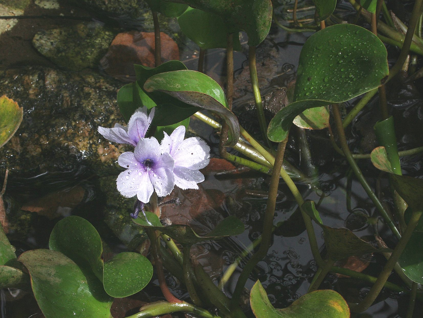 Eichhornia azurea Conservatoire botanique national de Brest, France, juin 2007